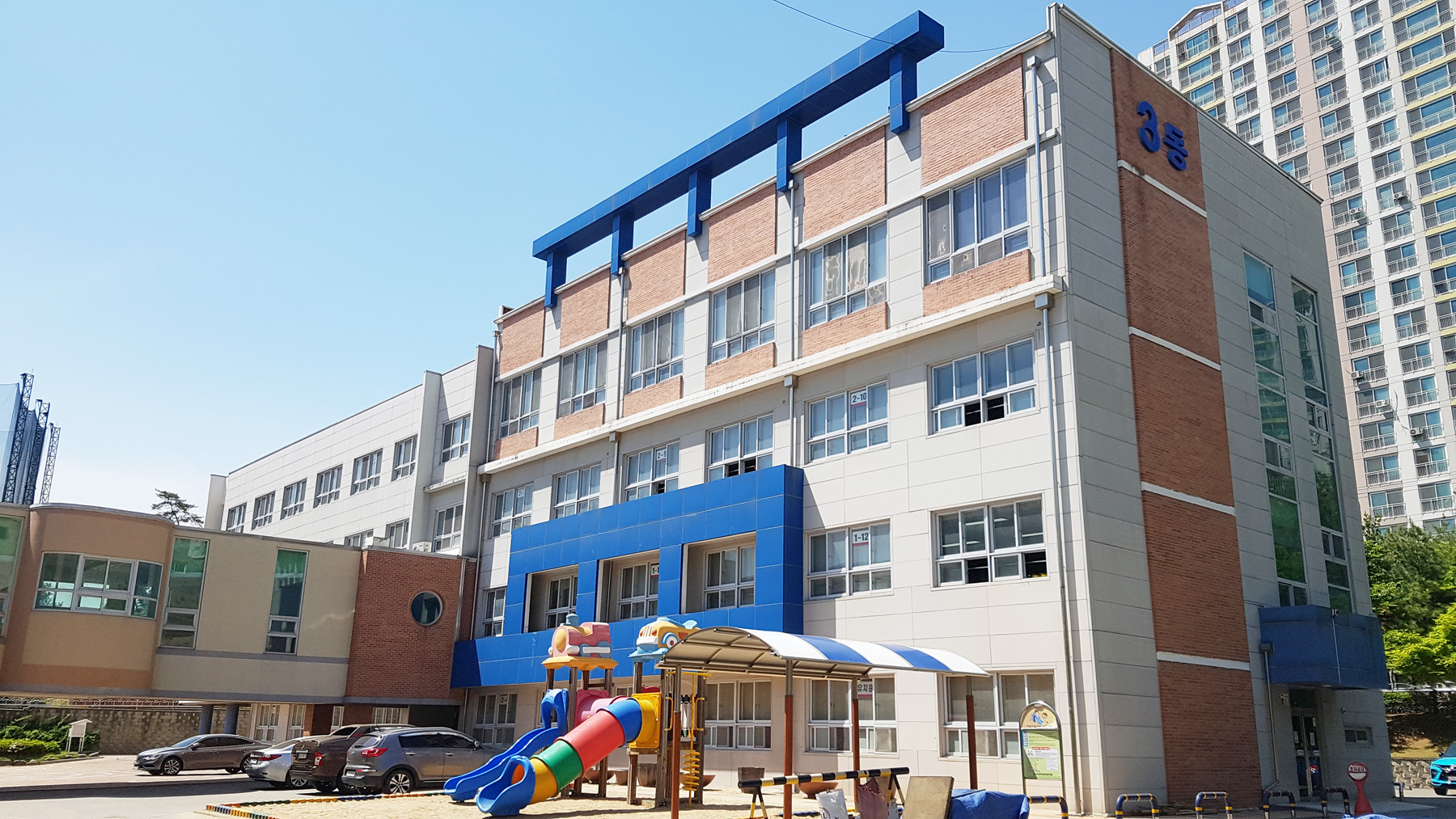 천안환서초등학교